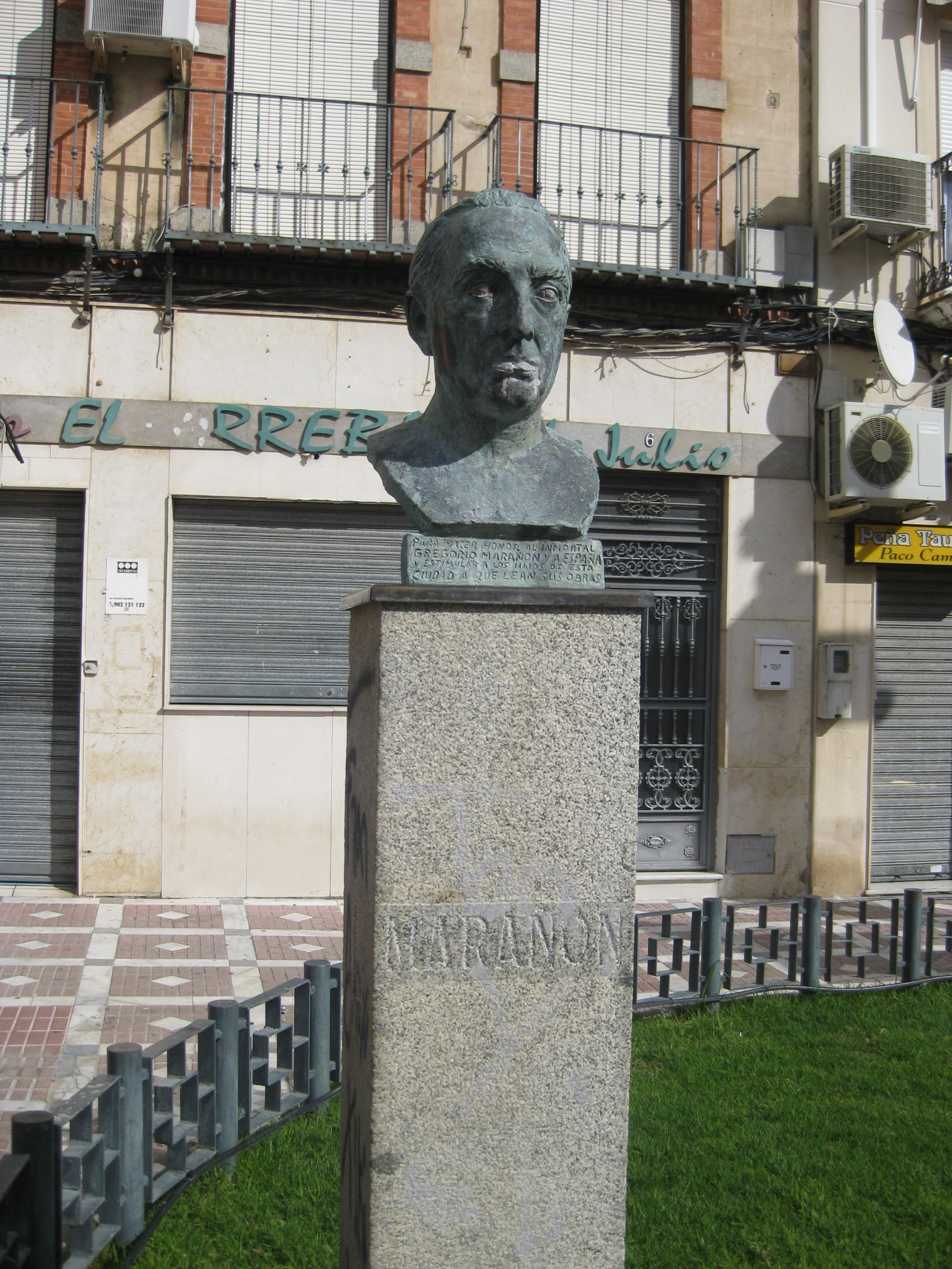 jodar oct 2012